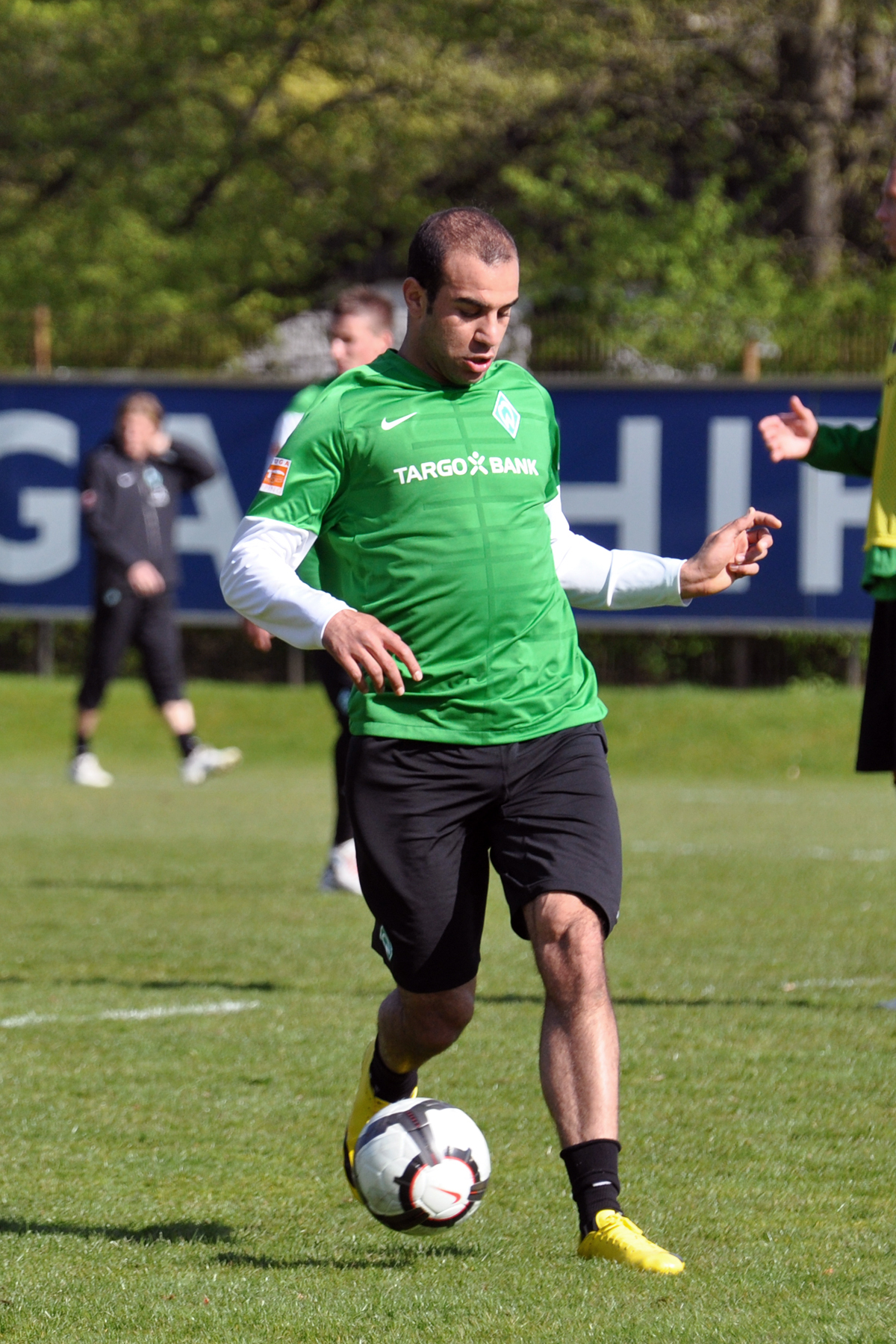 Aymen Abdennour